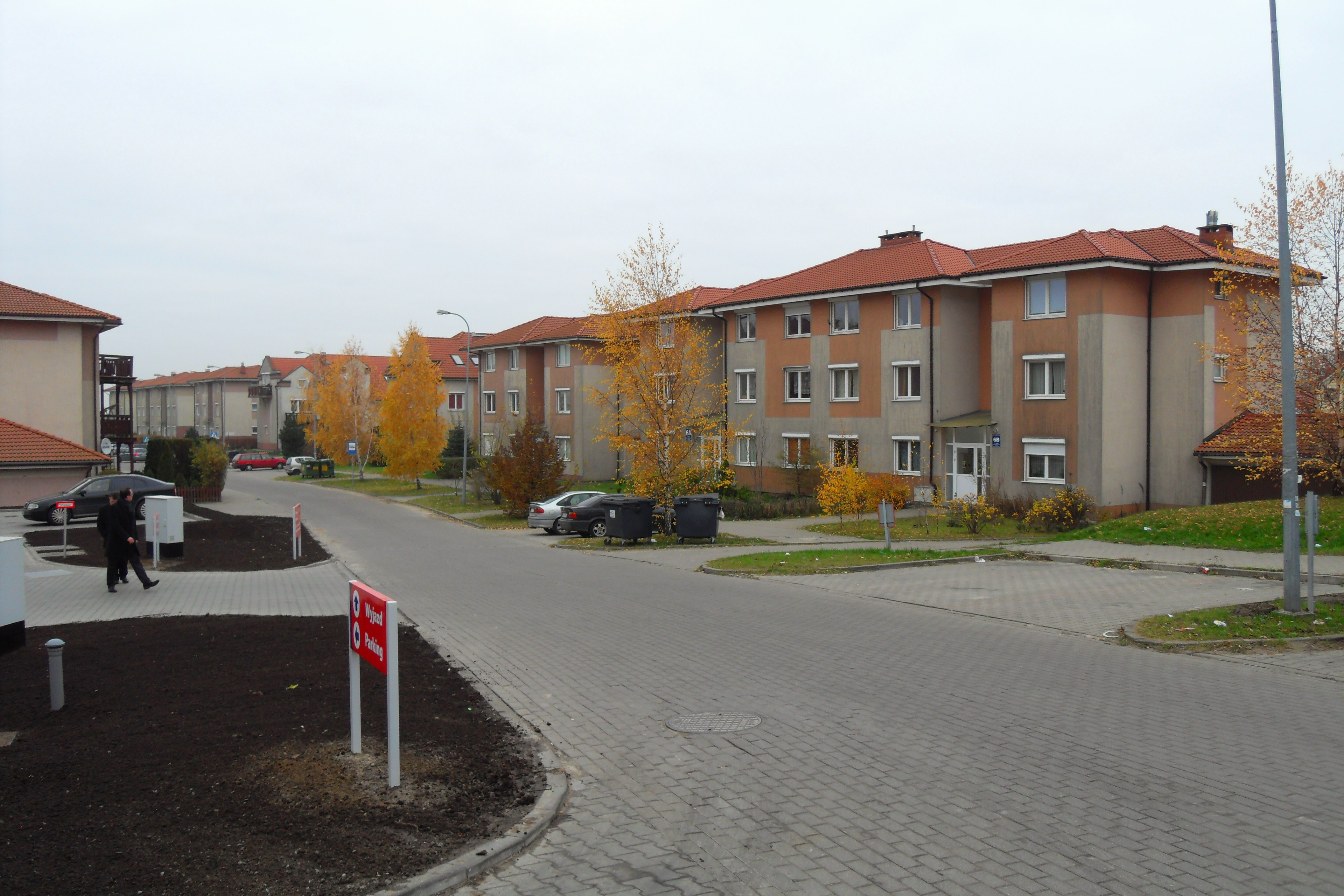 Kowale (powiat gdański), ul. Aresa (osiedle Olimp).